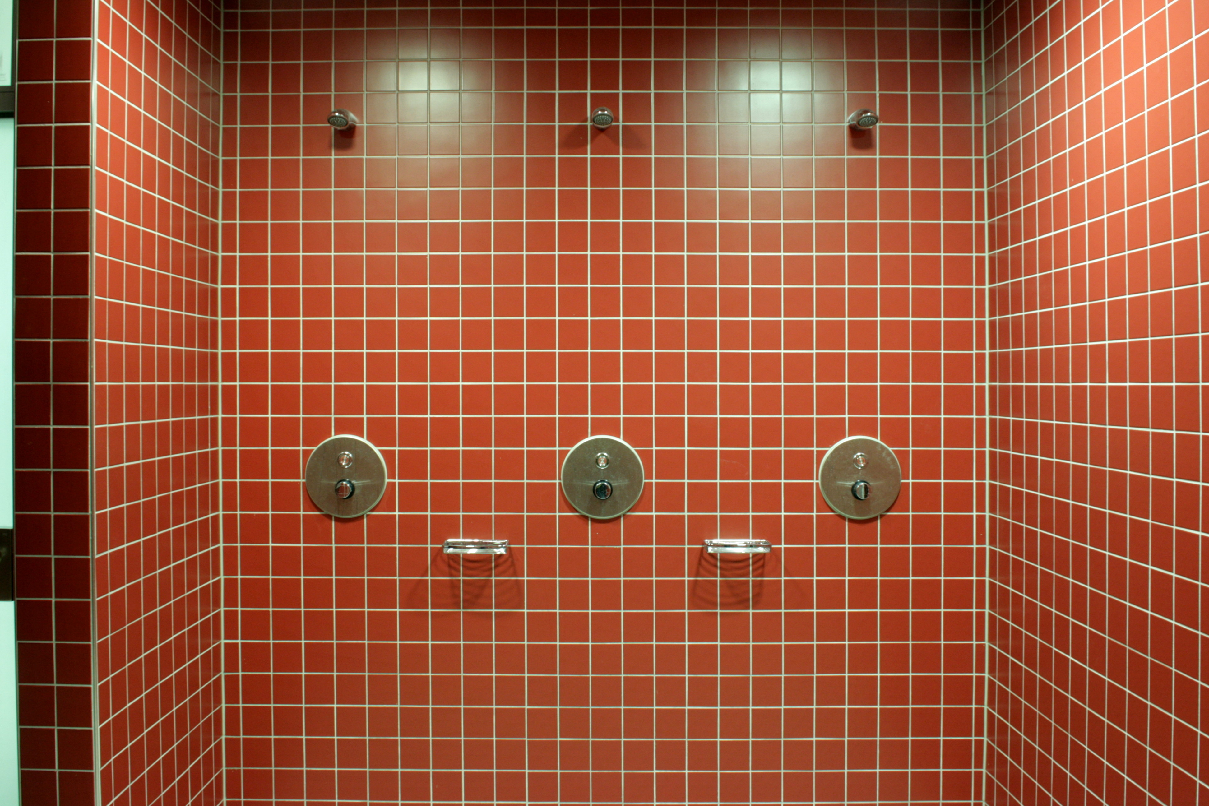 Schwimmoper in Wuppertal am Tag der offenen Tür (26.03.2010) anlässlich der Neueröffnung